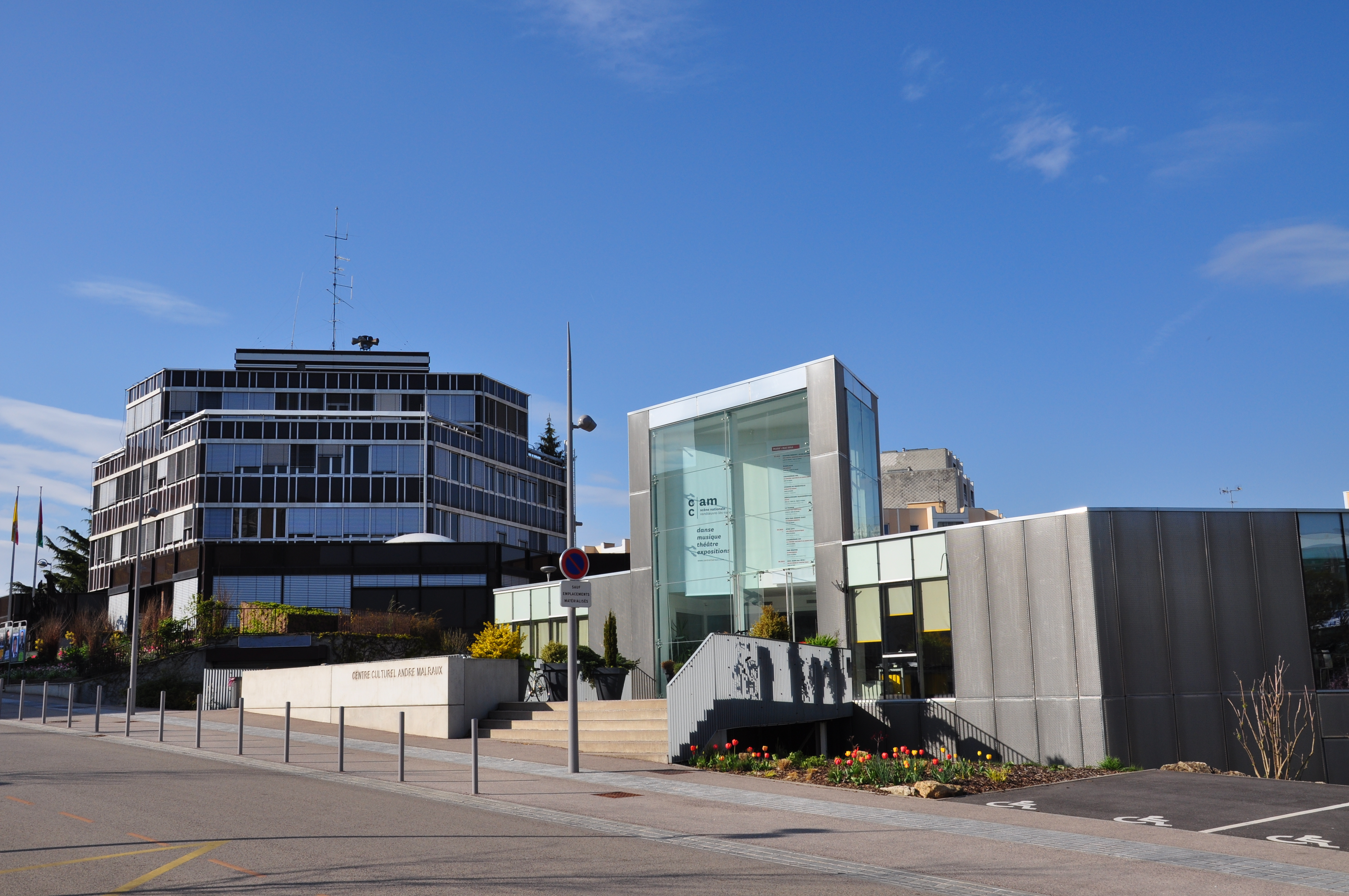 Hôtel de ville de Vandoeuvre-les-Nancy (à gauche) et entrée du Centre Culturel André Malraux (à droite)